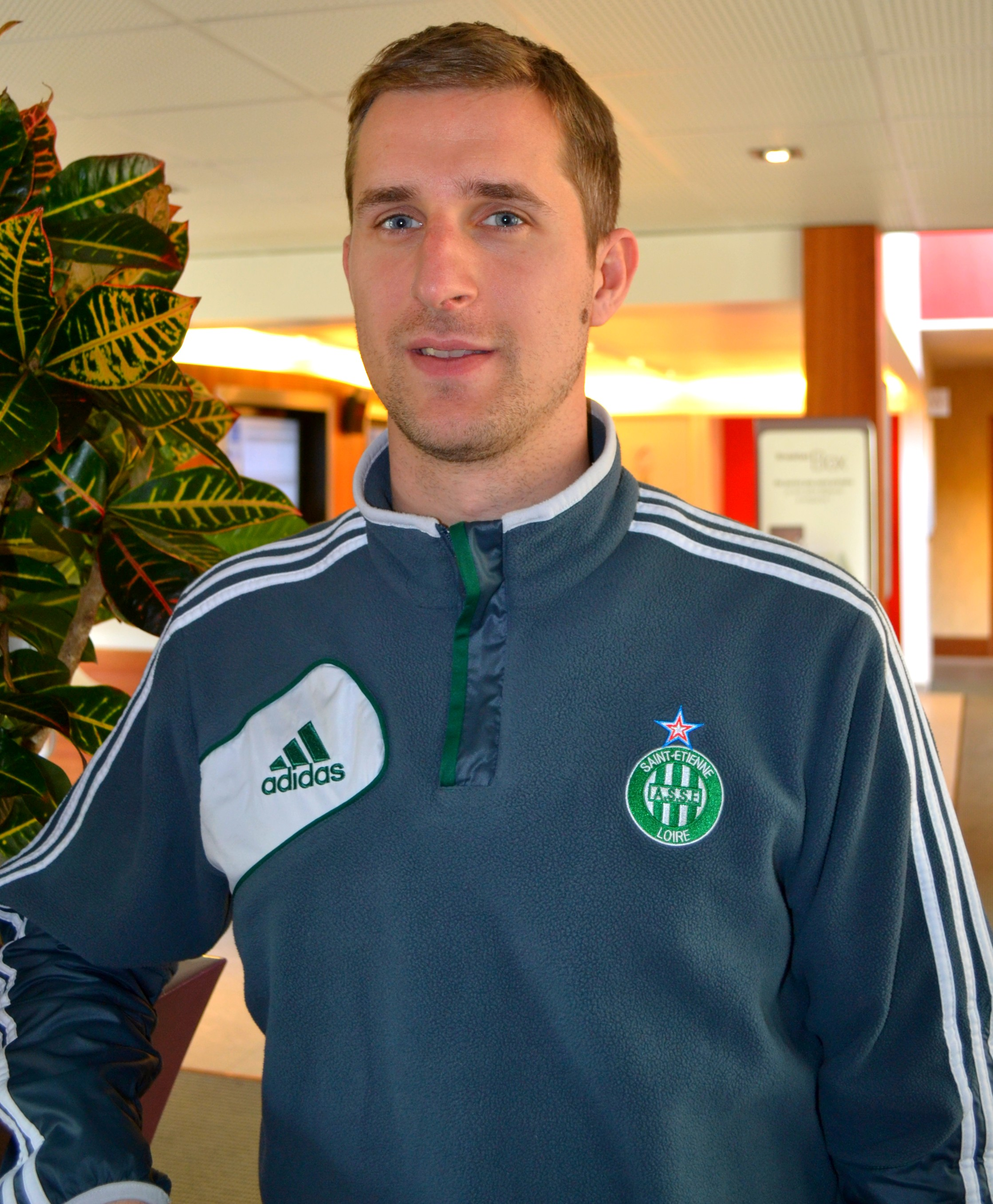 François Clerc, joueur de l'ASSE, en avril 2013